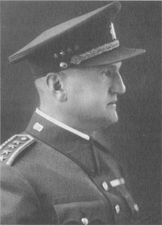 Jaroslav Konečný (* 4. ledna 1891, Kylešovice u Opavy - 20. ledna 1943, Berlín, Věznice Plötzensee) byl příslušníkem československých legií v Rusku. Po návratu z Vladivostoku (jako voják z povolání) prošel mnoha velitelskými funkcemi v prvorepublikové československé armádě. Po vypuknutí druhé světové války zůstal plukovník pěchoty Jaroslav Konečný v Protektorátu Čechy a Morava a zapojil se do činnosti ilegální (vojenské) odbojové organizace Obrany národa (ON). Zde fungoval jako spoluorganizátor Krajského velitelství ON - západní Čechy a později jako spolupracovník Oblastního velitelství ON - Velká Praha. Gestapo jej zatklo 25. července 1941, zpočátku byl vězněn v Praze na Pankráci, ale v létě roku 1942 byl převezen do Drážďan. Odtud putoval 3. října 1942 do berlínské věznice Alt Moabit. Při soudním přelíčení 8. října 1942[4] před berlínským lidovým soudem (Volksgericht) byl společně s plukovníkem generálního štábu Jaroslavem Lisým odsouzen za velezradu a zemězradu k trestu smrti. Po procesu byl převezen do věznice v Berlíně-Plötzensee, kde byl 20. ledna 1943 ve večerních hodinách popraven gilotinou. V roce 1947 byl posmrtně povýšen do hodnosti brigádního generála.